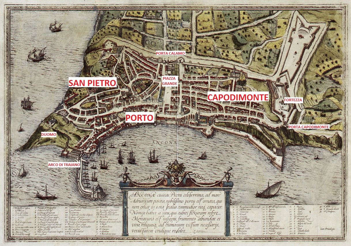 carta di Ancona nel 1500 - aggiunti i nomi dei terzieri